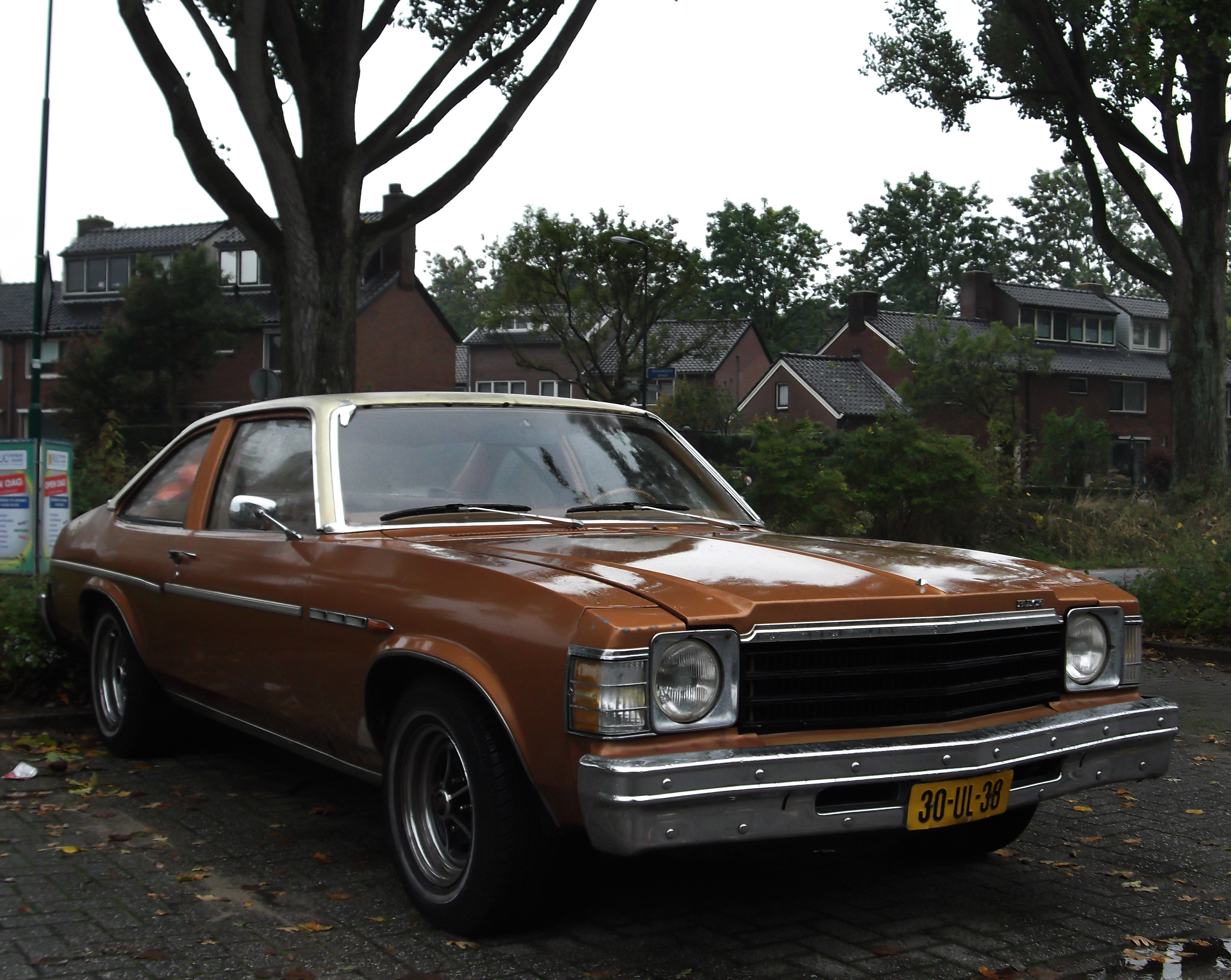 1978 Buick Skylark